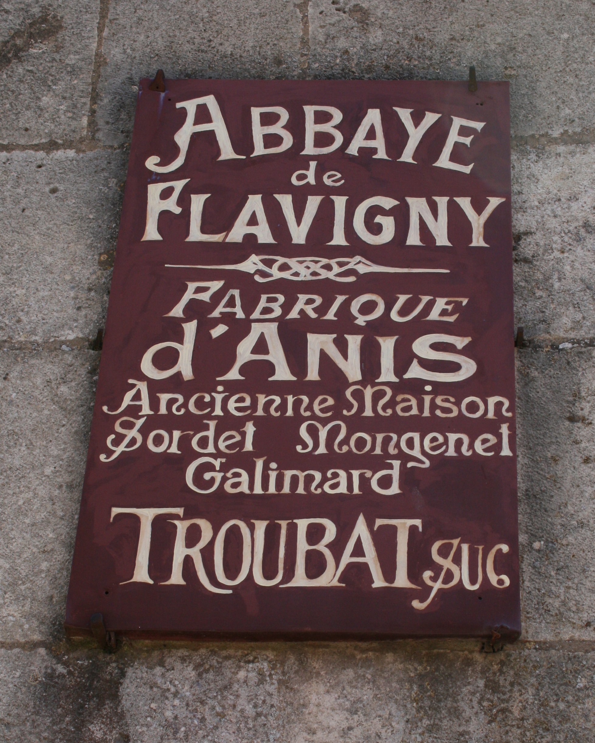 Flavigny sur Ozerain Maison Troubat, Bourgogne, FRANCE.